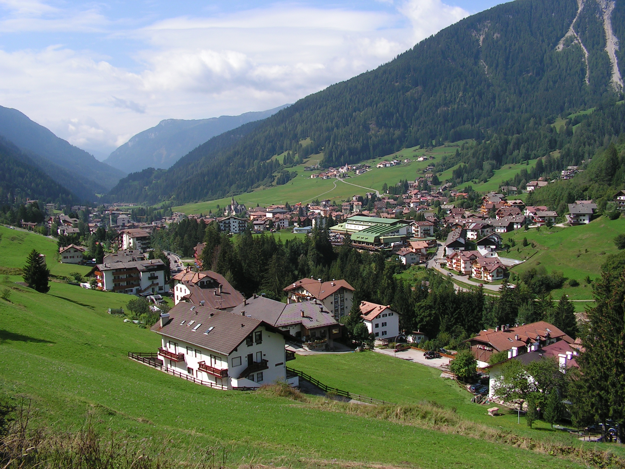 A view of Moena